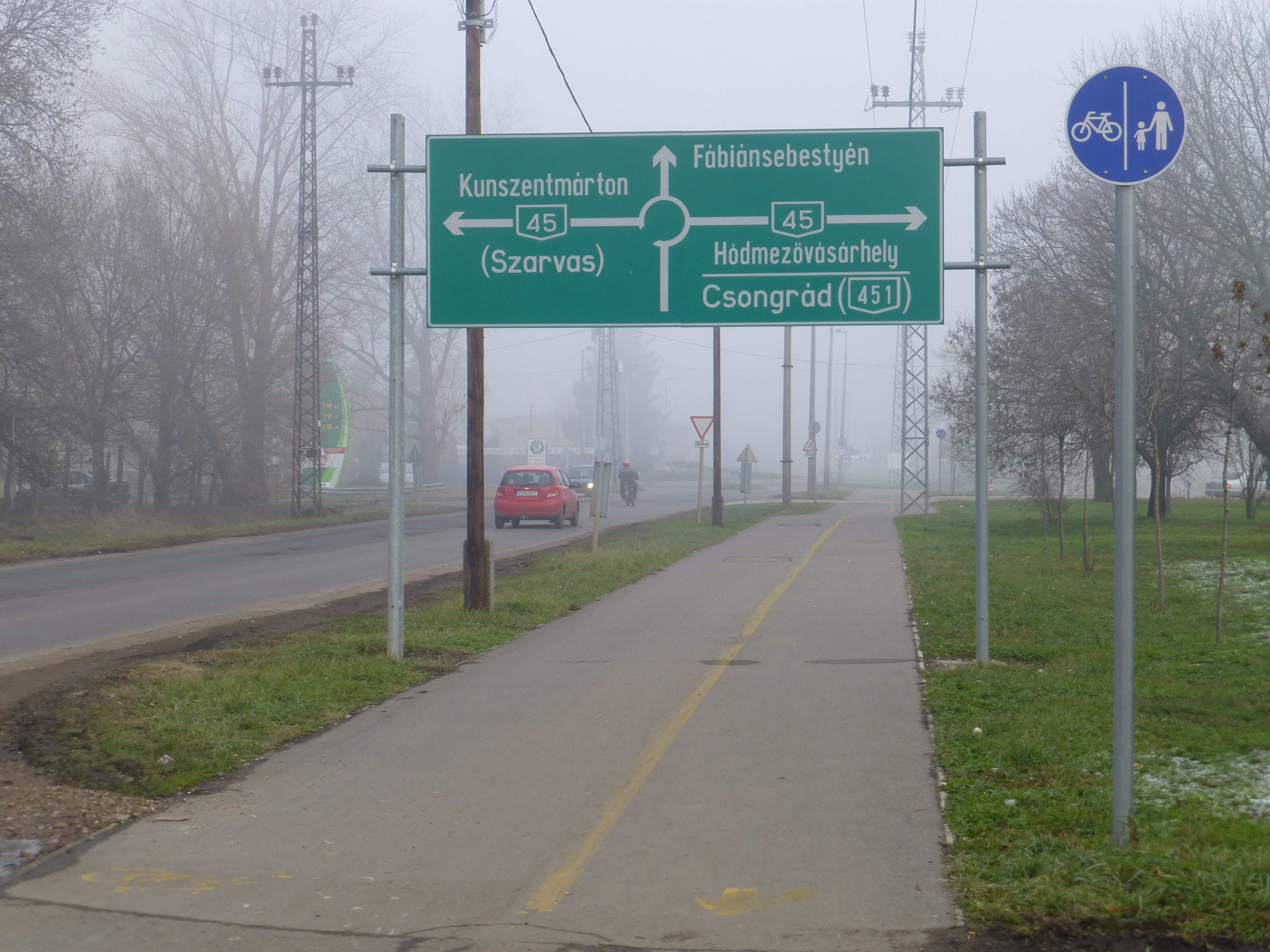 kerékpárút Szentesen